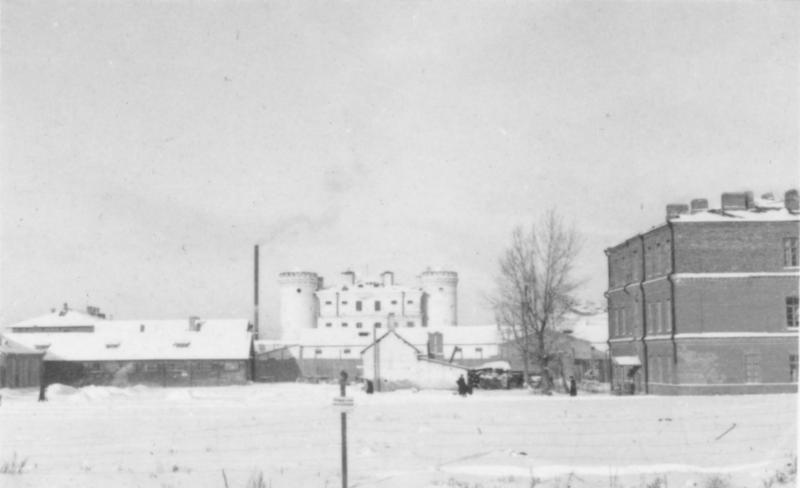 Minsk, 1. Dez. 1942 Gefängnis Einsatzstab Reichsleiter Rosenberg für die besetzten Gebiete - Hauptarbeitsgruppe Ostland Film: 49/16